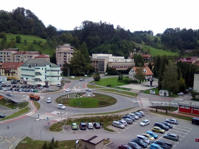 Zagorje ob Savi rondo